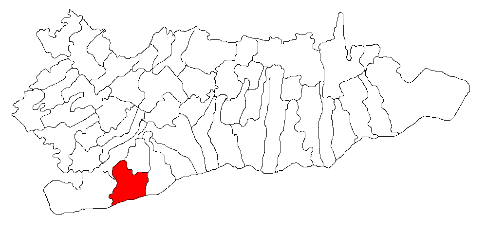 Categorie:Hărţi ale judeţului Călăraşi